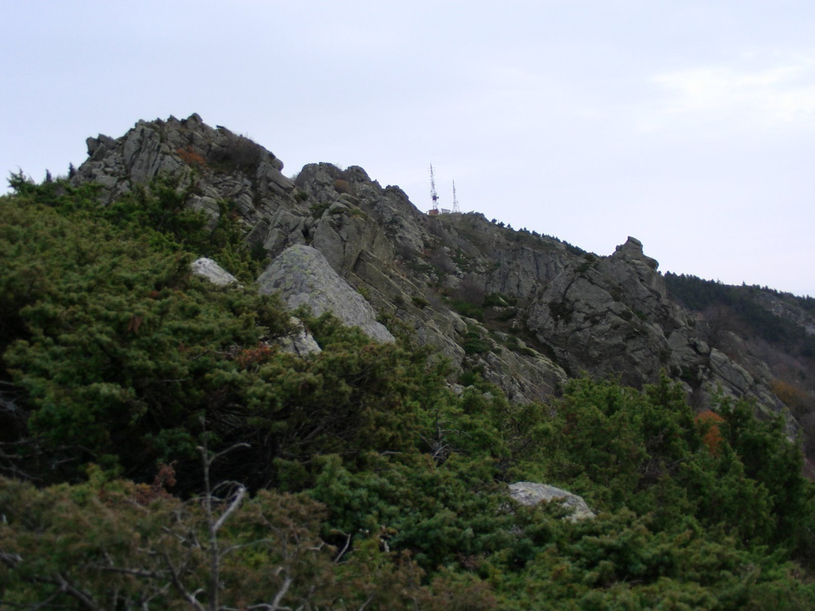 Vista del Roc de Frausa